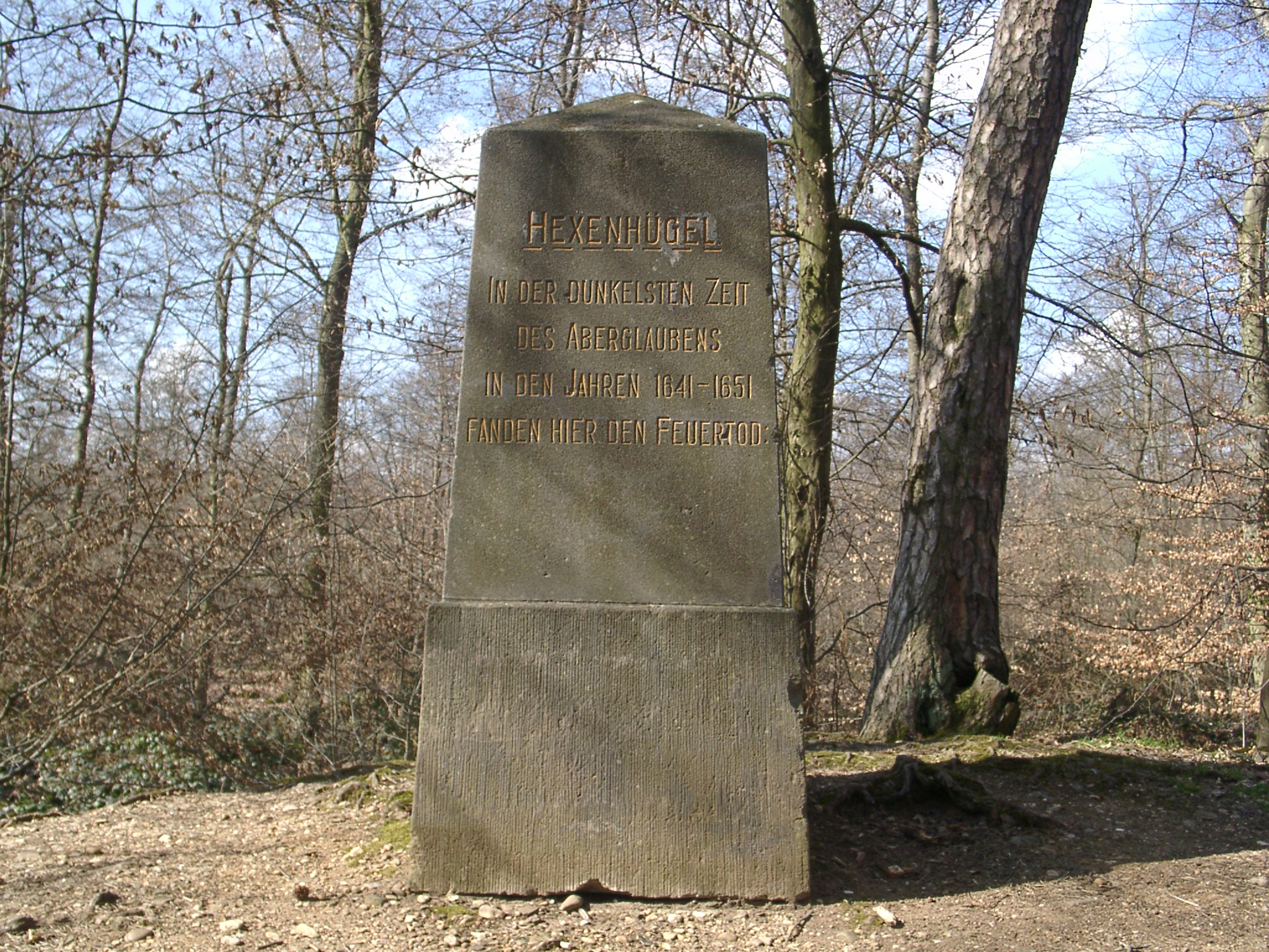 Winningen Hexendenkmal